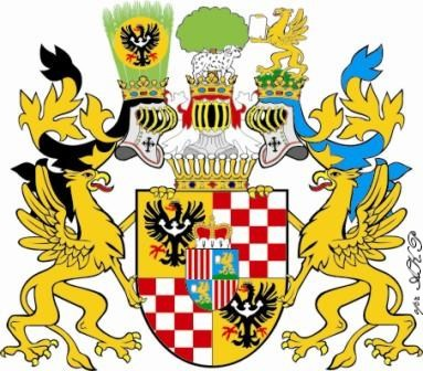 Schaffgotsch - herb hrabiów z 1708 r. (opr.: AK-P) Jestem autorem tej grafiki (moje godło zgodnie ze zwyczajem zamieściłem na grafice). Zgadzam się na jej wykorzystanie w wikipedii, bo też i sam ją tam osobiście umieściłem, jako ilustrację do artykułu, którego pierwszą wersję popełniłem. Pozdrawiam --AK-P 16:54, 23 maj 2005 (CEST)